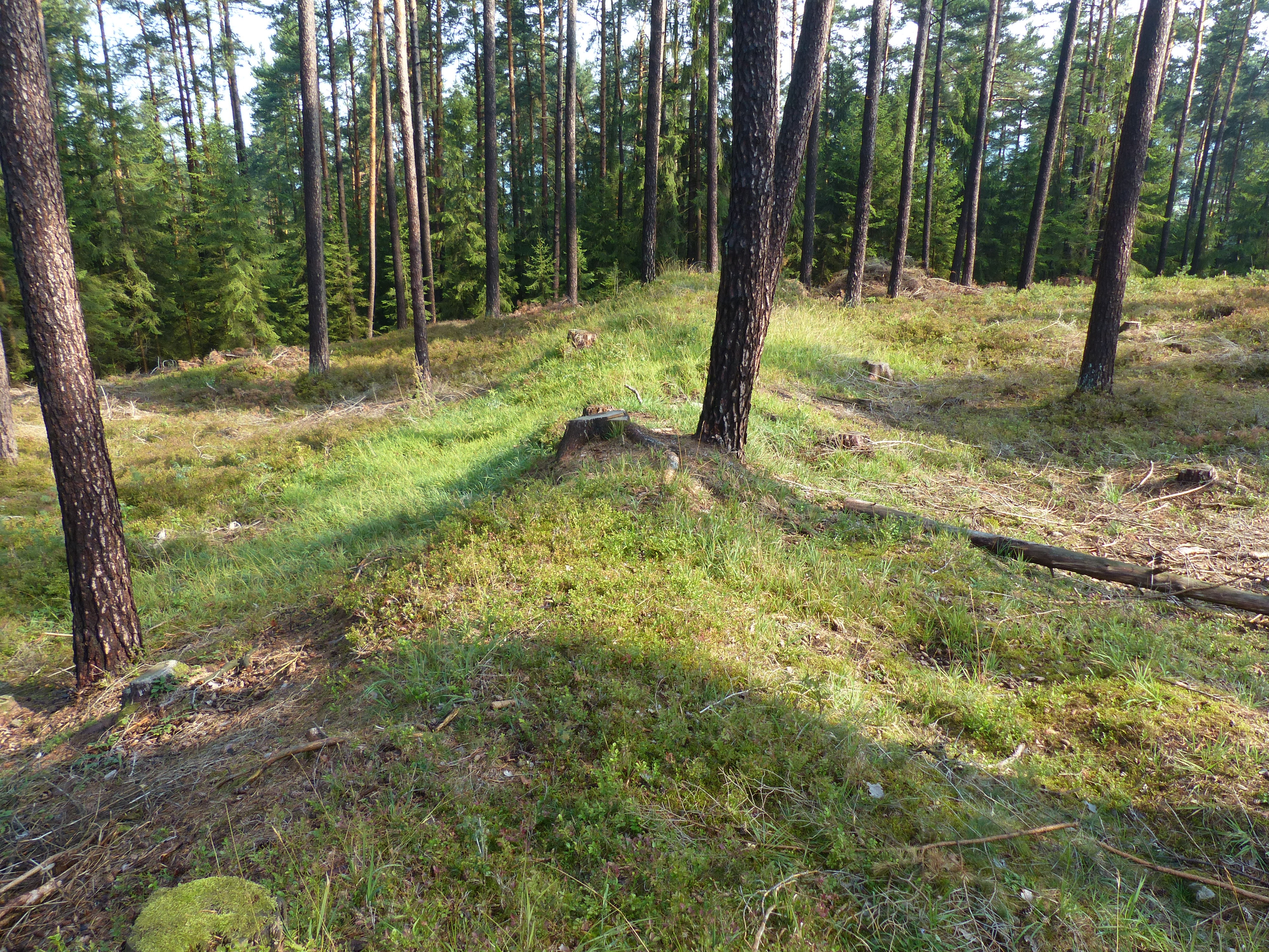 Spuren des Burgstalls am Schlossberg, wesltiche Spur der Außenmauer